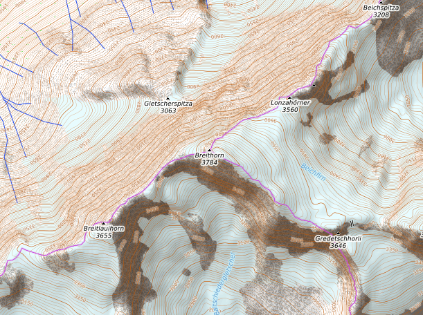 carte réalisée sur umap This map may be incomplete, and may contain errors. Don't rely solely on it for navigation.